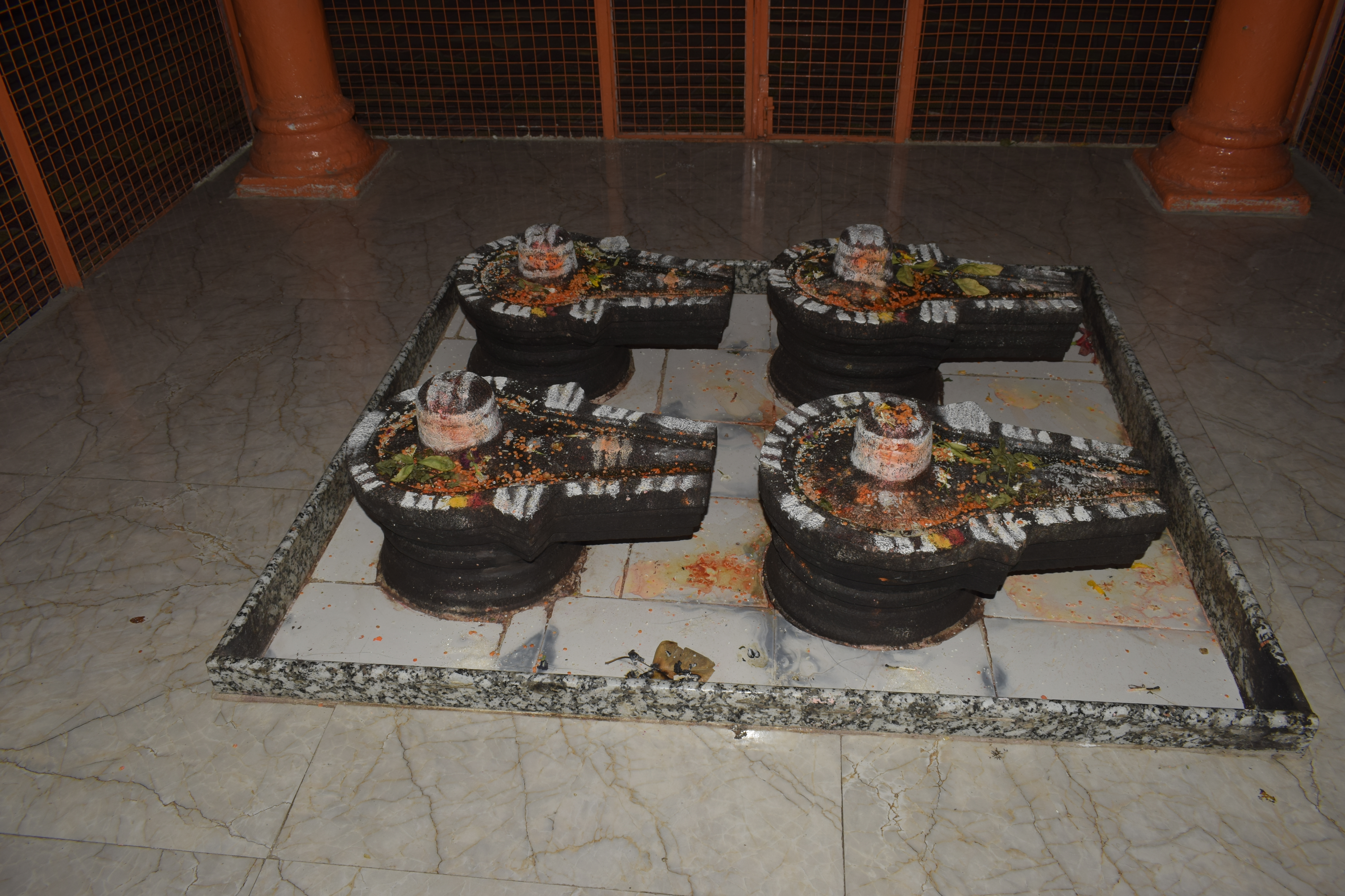 श्री हावगेश्वर लिंग